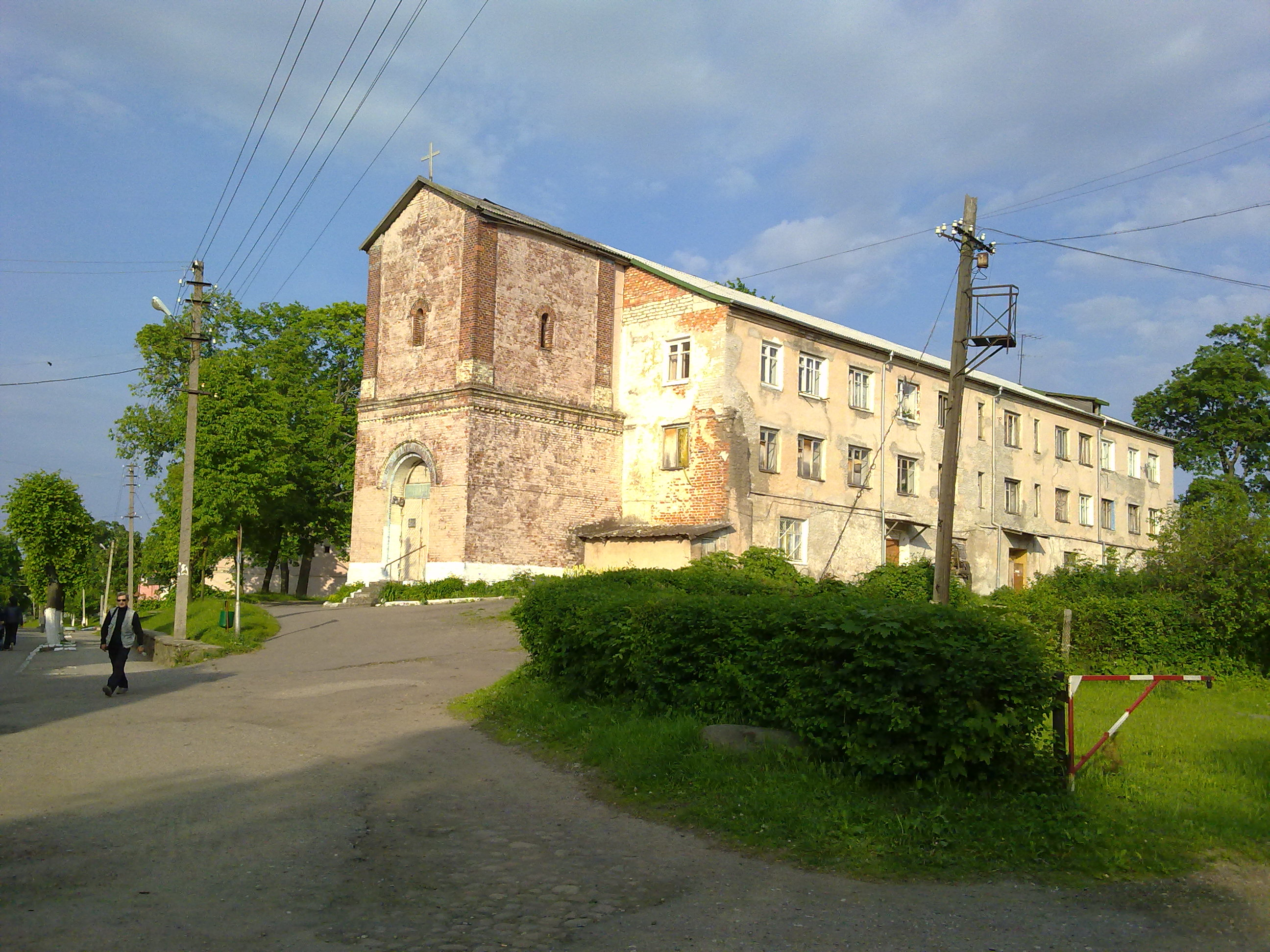 Неман, Ragnit, Kirche (Fragment)